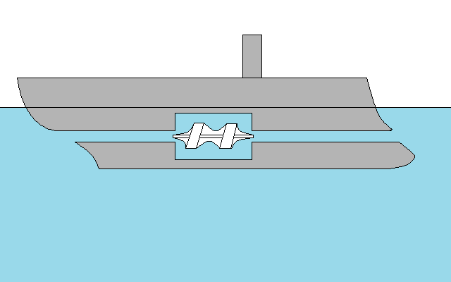 Antriebsprinzip der General-Admiral